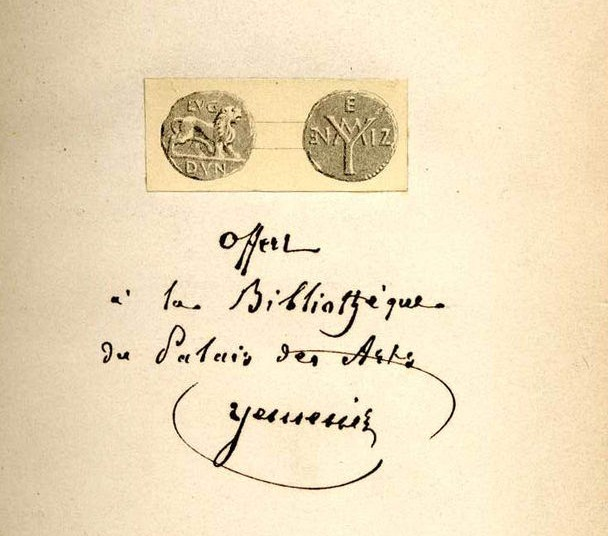 Ex-dono manuscrit de Nicolas Yemeniz au Palais des arts, accompagné d'un ex-libris imprimé - coll. Bibliothèque municipale de Lyon. Cote 474811